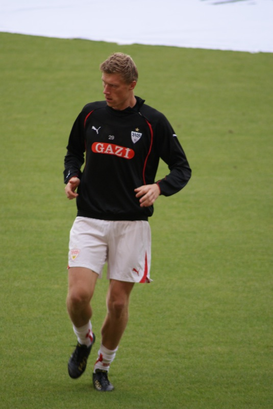 Pawel Wiktorowitsch Pogrebnjak